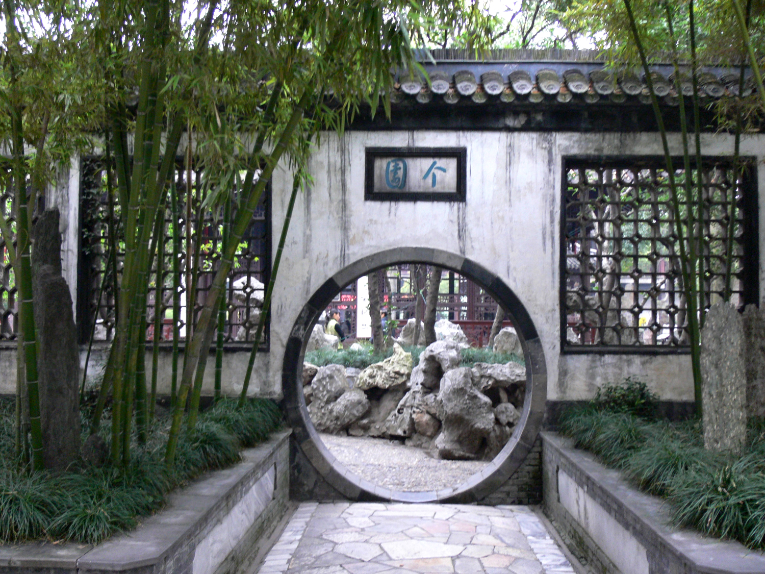 Ge Yuan:Bamboo Garden in Yangzhou 个园